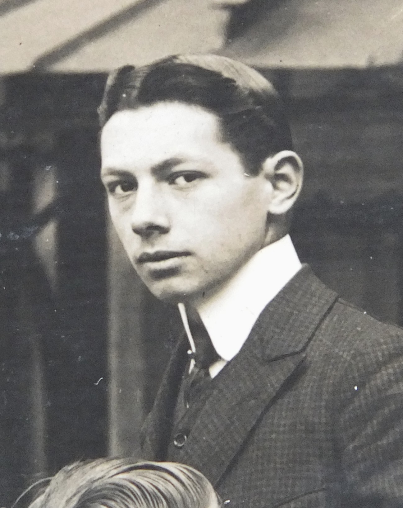 Léon Moussinac à 17 ans sur une photo de classe au Lycée Charlemagne (1907) - Photographe Jules David, Levallois. Photo inédite (collection personnelle)